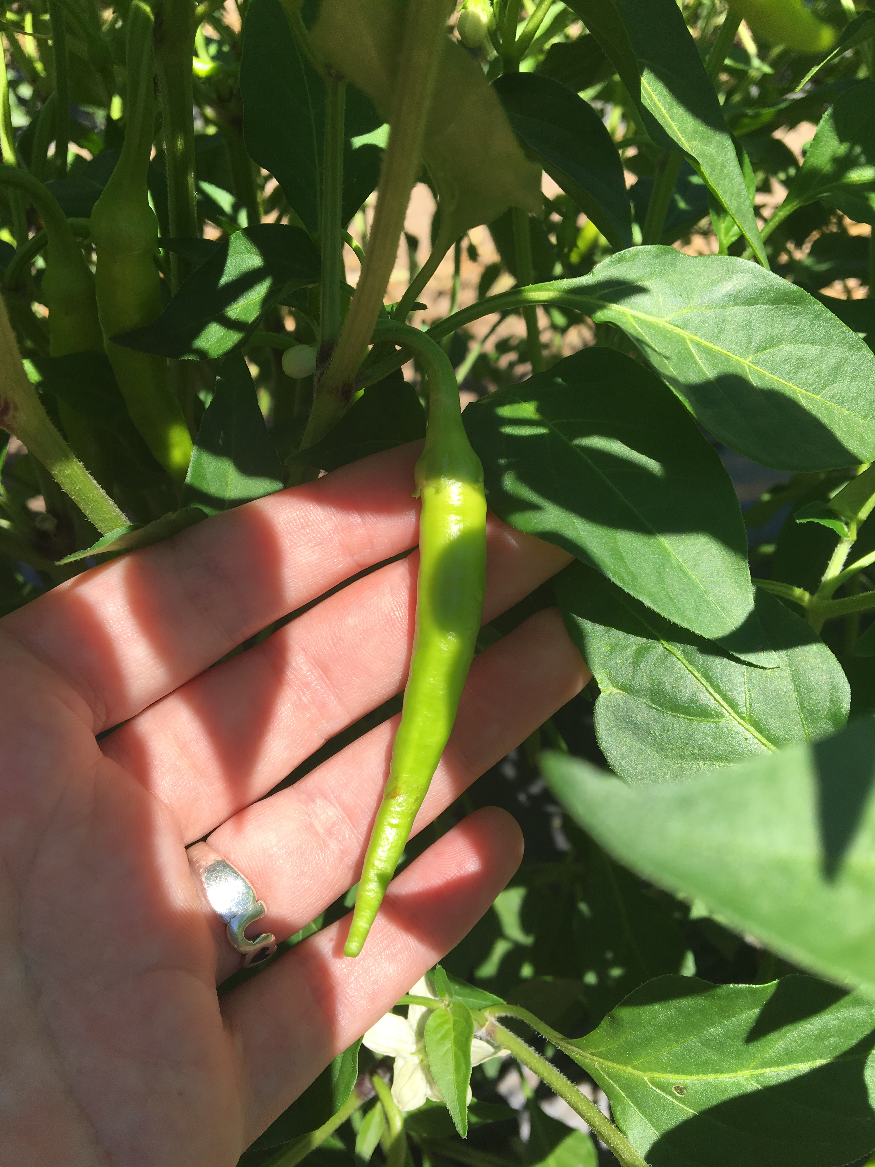 La Guindilla de Ibarra se recolecta durante los meses de Julio y Septiempre